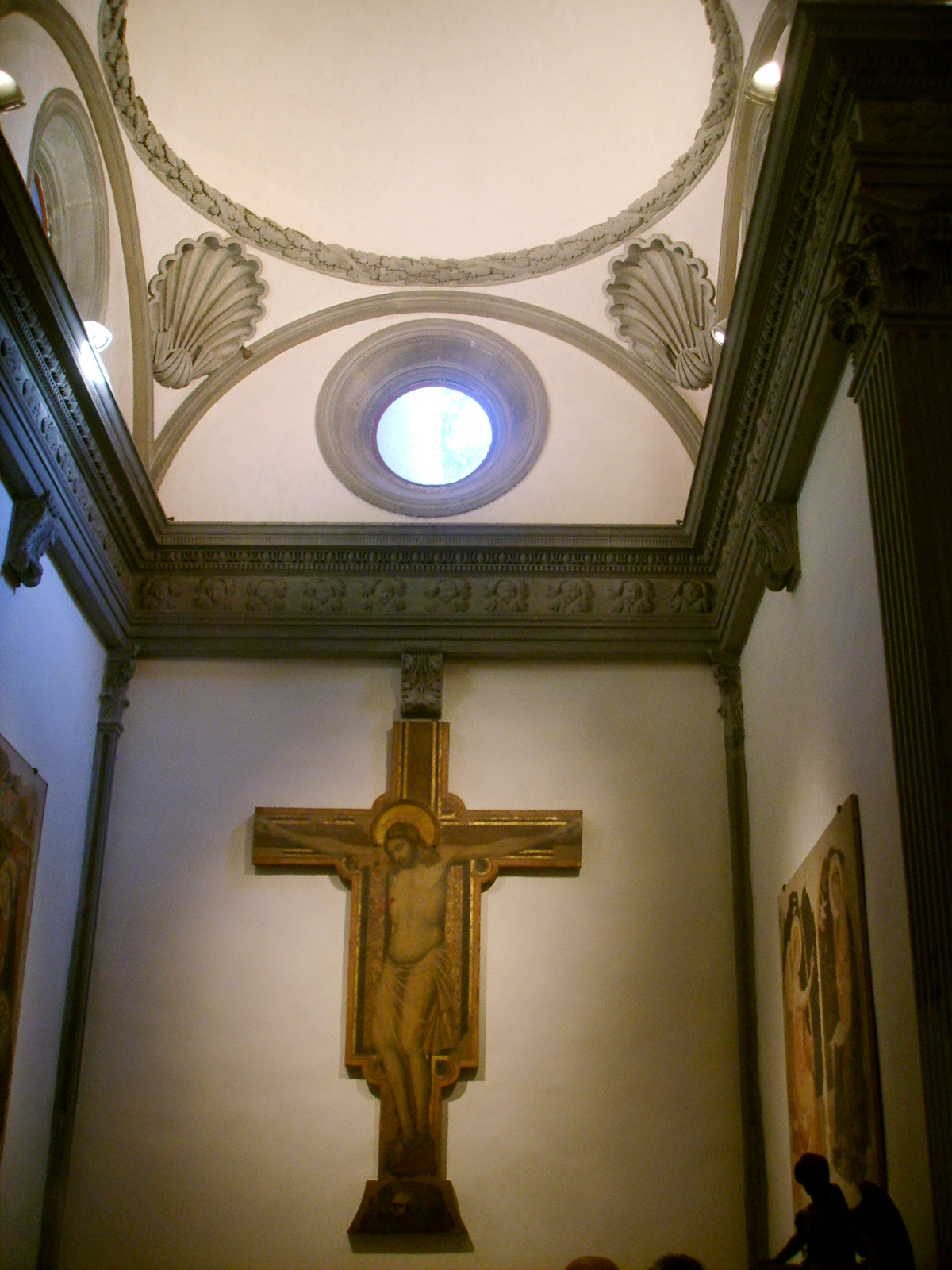 Santa_Felicita, chiesa in Florence, abside_con_Crocifisso_di_Pacino_di_Buonaguida_(prima_metà_XIV_sec.)